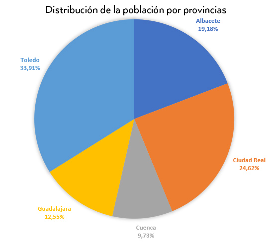 Distribución de la población por provincias en Castilla-La Mancha